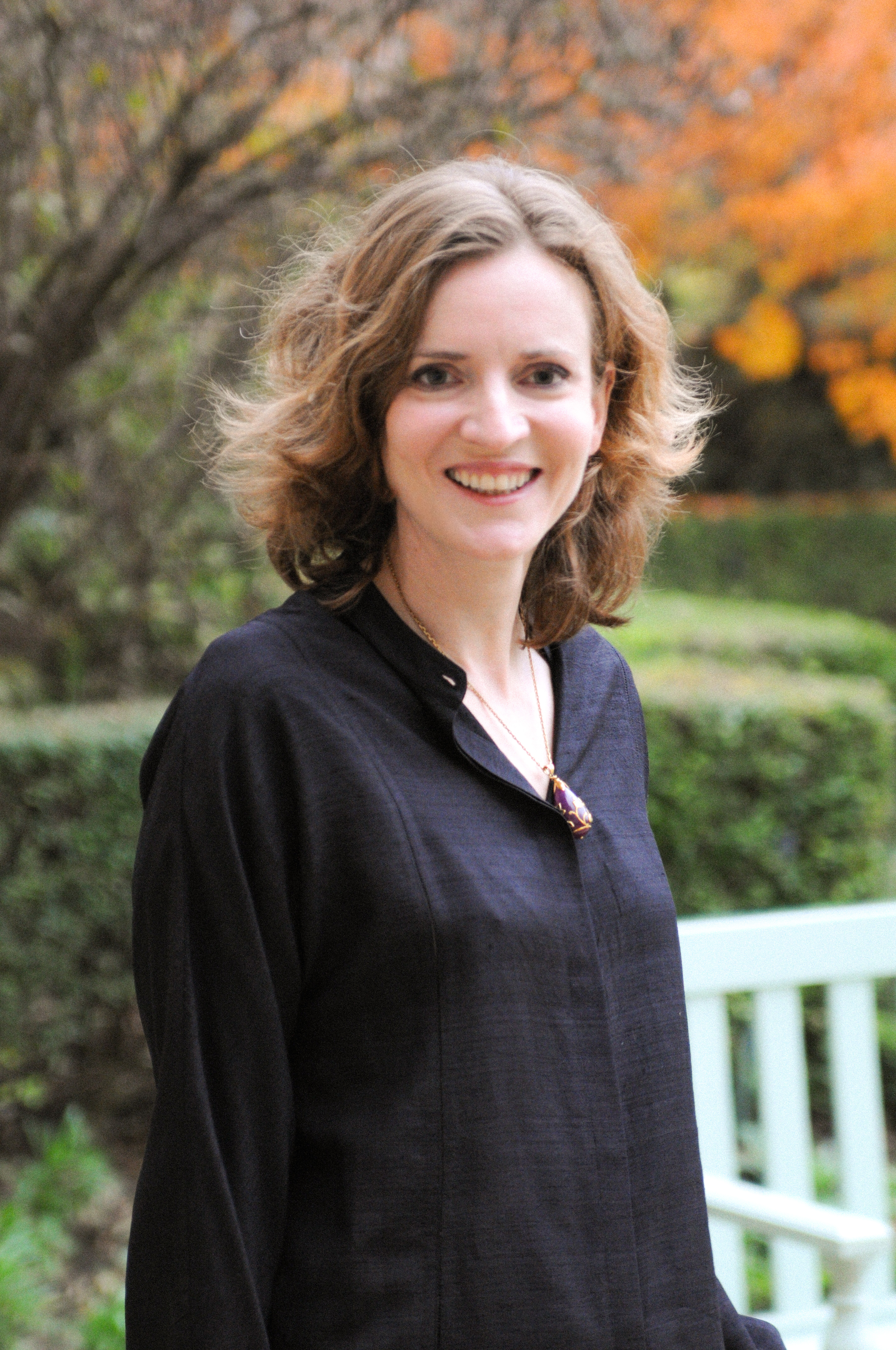 Nathalie Kosciusko-Morizet, décembre 2014